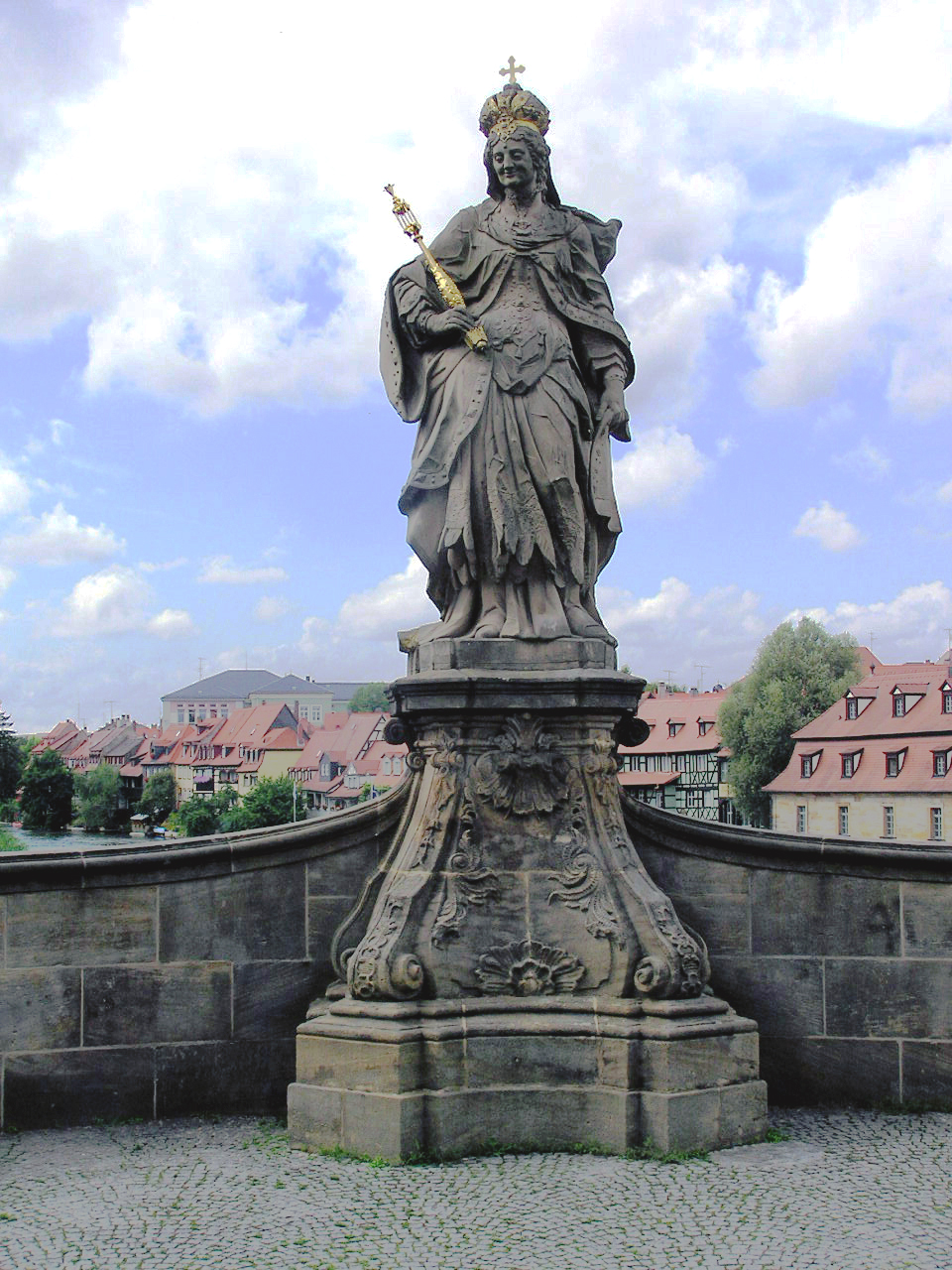 Bamberg, Hl. Kunigunde an der Unteren Brücke